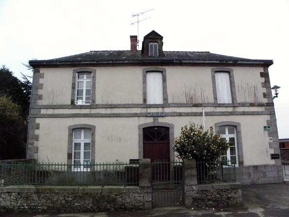 Mairie de La Fontenelle (35).